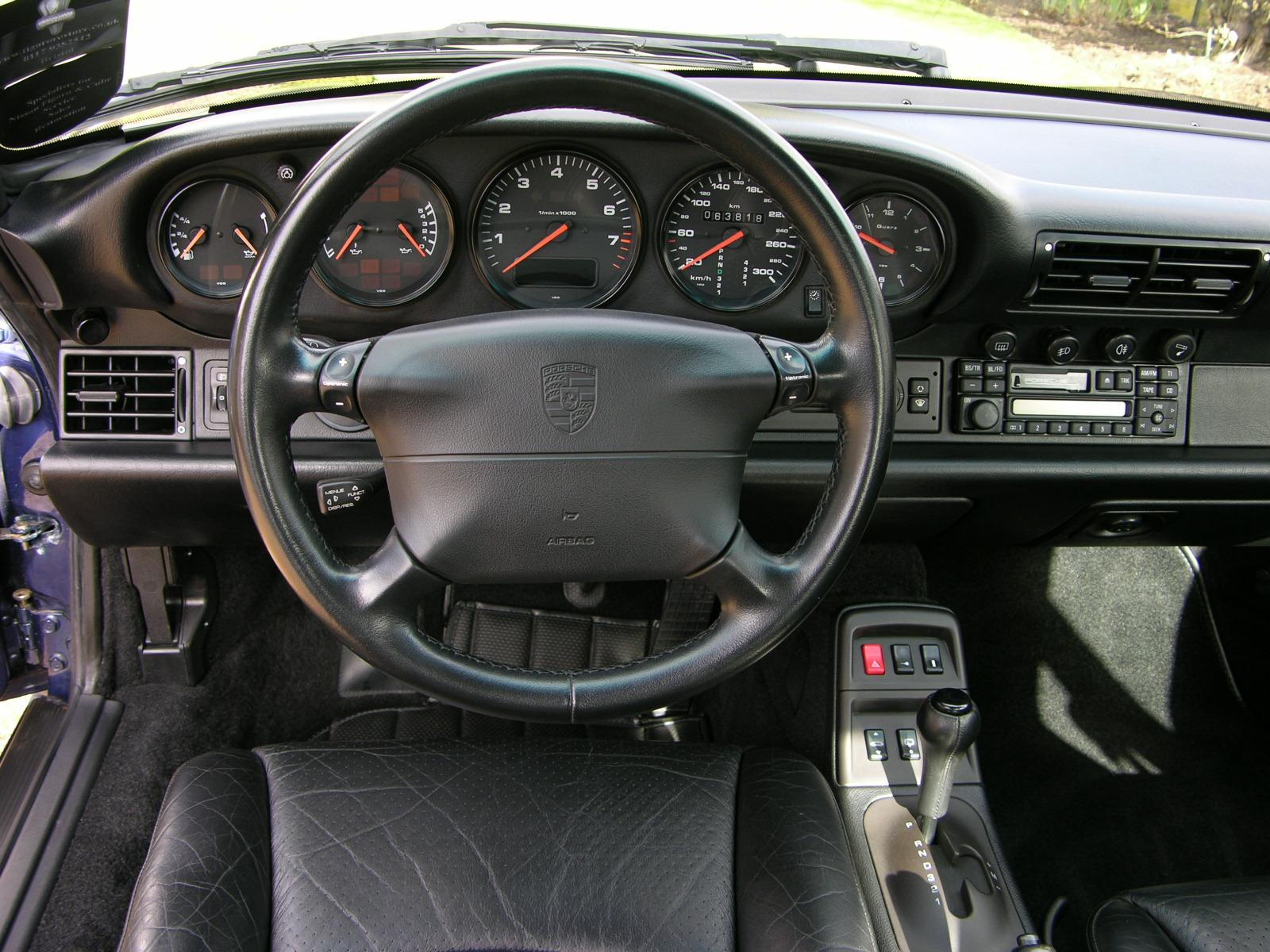 Porsche 911 Carrera 2